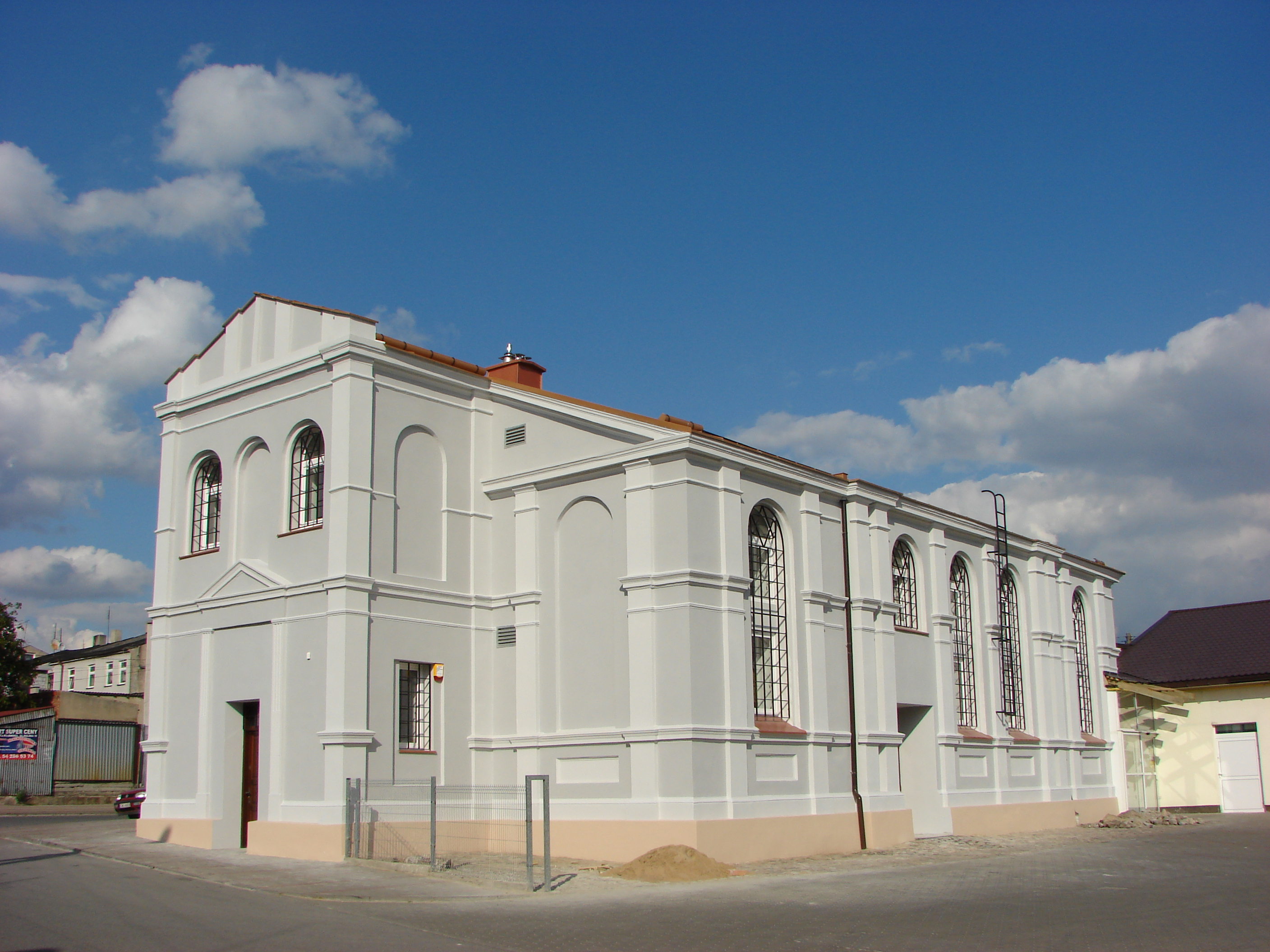 Izbica Kujawska, bożnica, poł. XIX